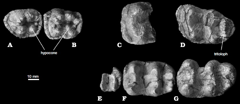 Dental elements of the proboscidean Chilgatherium harrisi Sanders, Kappelman, and Rasmussen, 2004, from the Upper Guang and Gahar Valley sections (late Oligocene), Chilga region, Ethiopia. A. Right P3 (CH9–22) reversed for consistency. B. Left P4 (CH9–7). C. Protoloph of left ?M2 (CH12–4). D. Right M3 (CH35–1) reversed for consistency. E. Tritolophid of right m1 (CH35–3d) reversed for consistency. F. Left m2 (CH35–3a). G. Right m3 (CH35–3c) reversed for consistency. All in occlusal views.